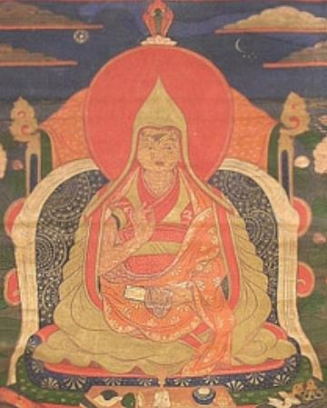 Gendun Drup, 1st Dalai Lama